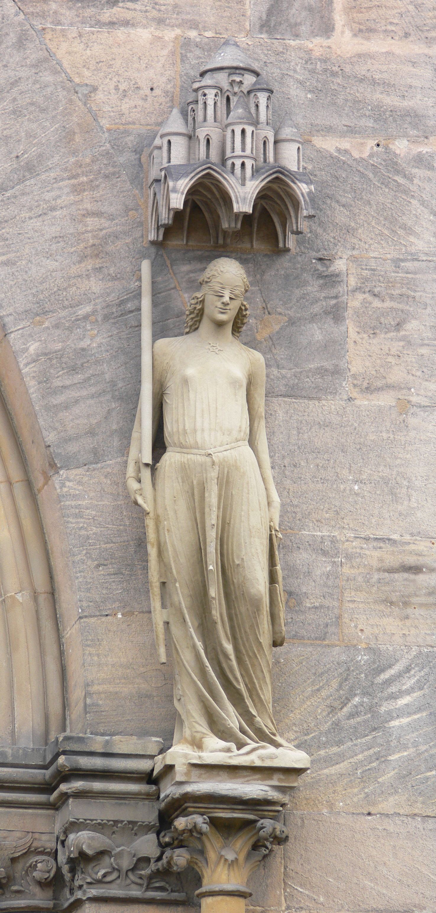 Bamberg, Dom St. Peter und St. Georg Fürstenportal: Synagoge